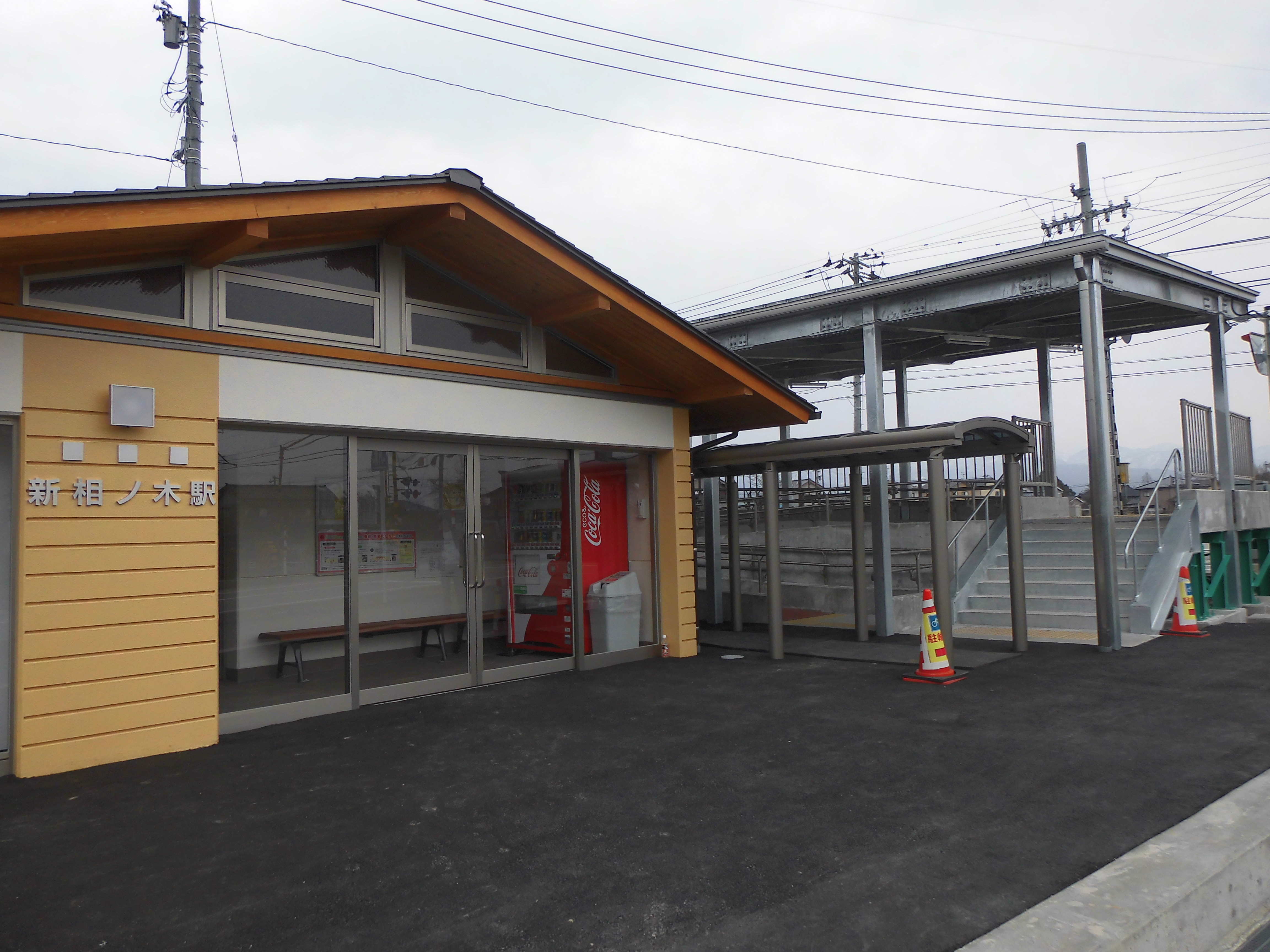 富山地方鉄道本線 新相木駅駅舎